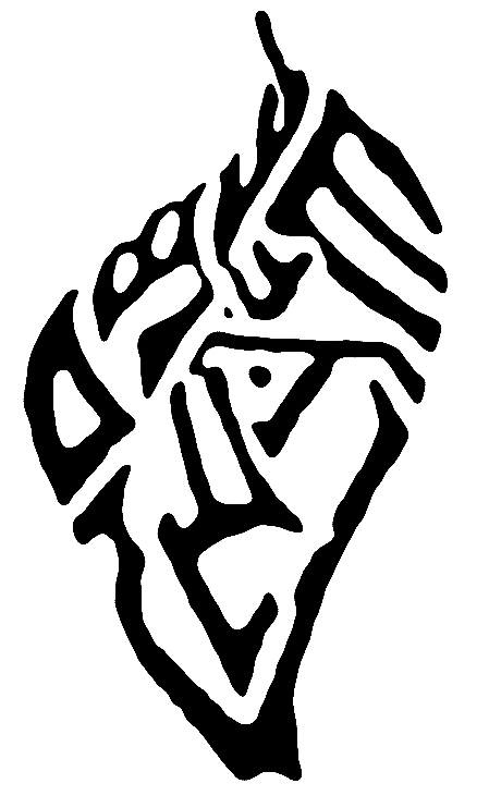 לוגו שומרוני. "שמע ישראל" בכתב השומרוני (וריאציה של האלפבית העברי העתיק) בצורת להבה. רישיון[edit] נוצר על ידי משתמש:שמוליק